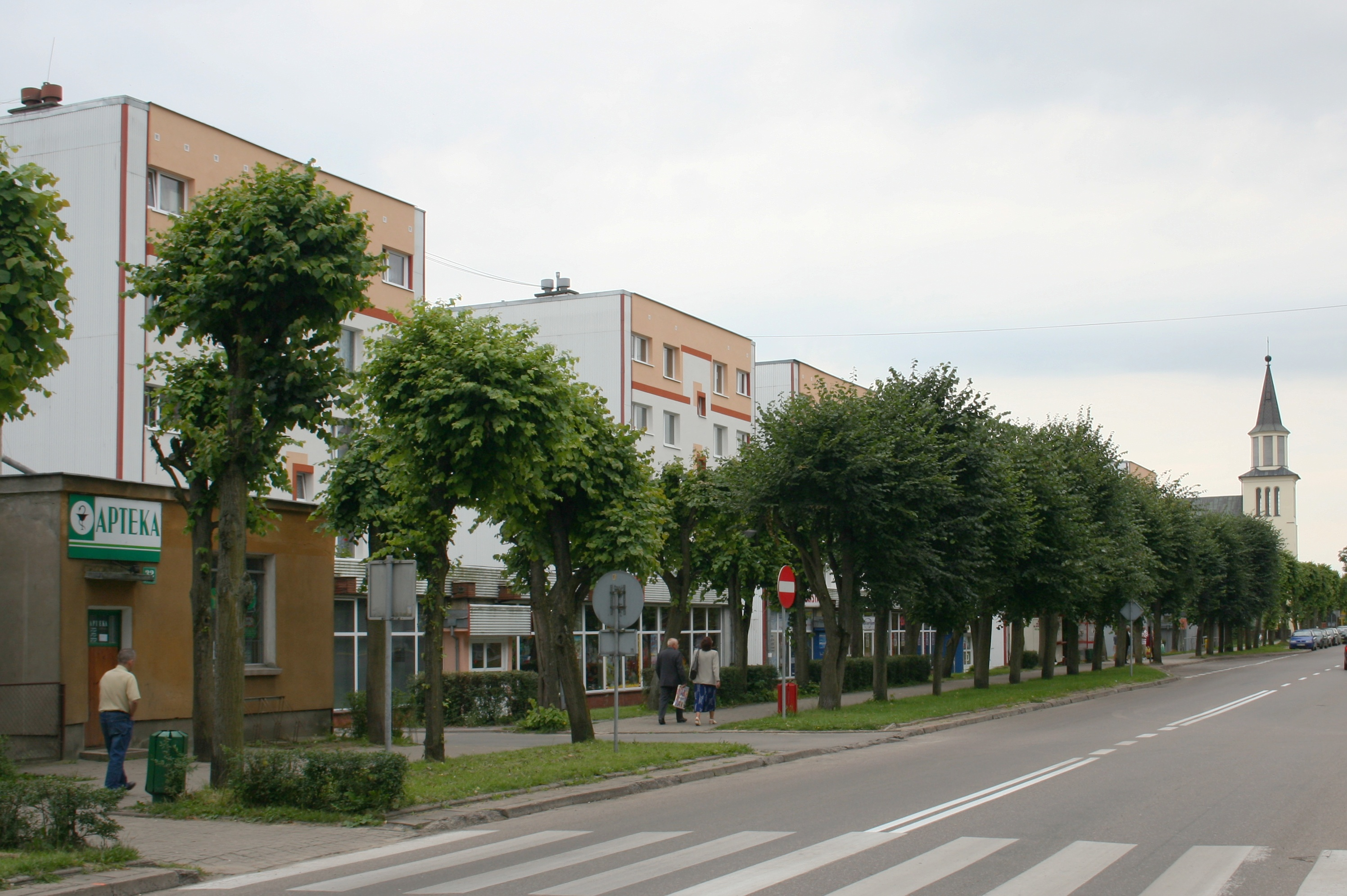 Ulica 3-go maja w Hajnówce, fragment